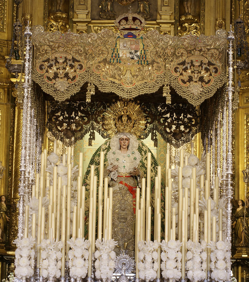 Hermandad de la Macarena. Palio de la Virgen. Fotografía propia realizada por Manuel Francisco Álvarez Ruiz.